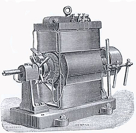 Joseph Jaspar (Liège, 26 juillet 1823 - Liège, 9 avril 1899) est un électricien et un industriel liégeois fondateur de l'Atelier Jaspar.